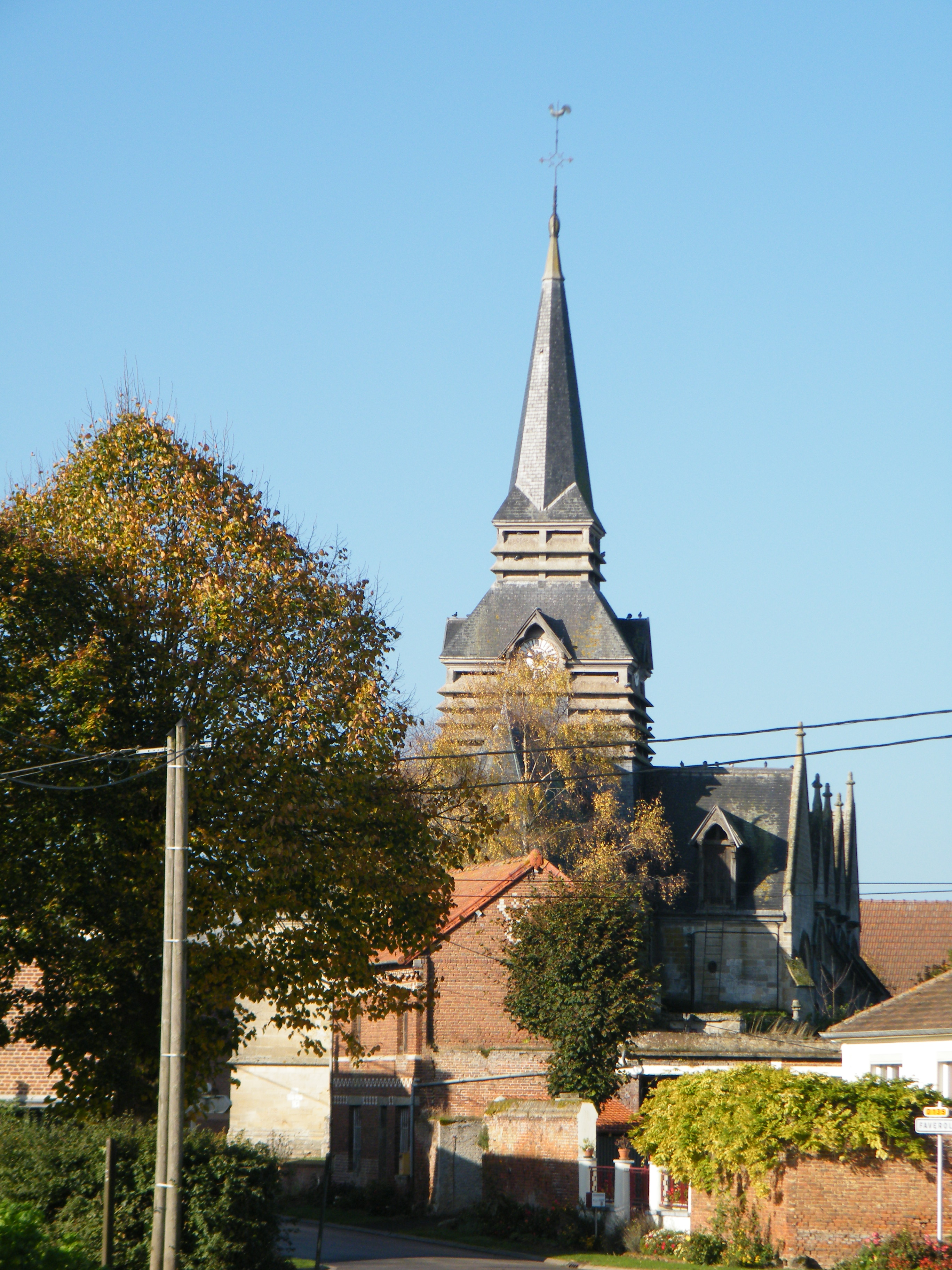 L'église.